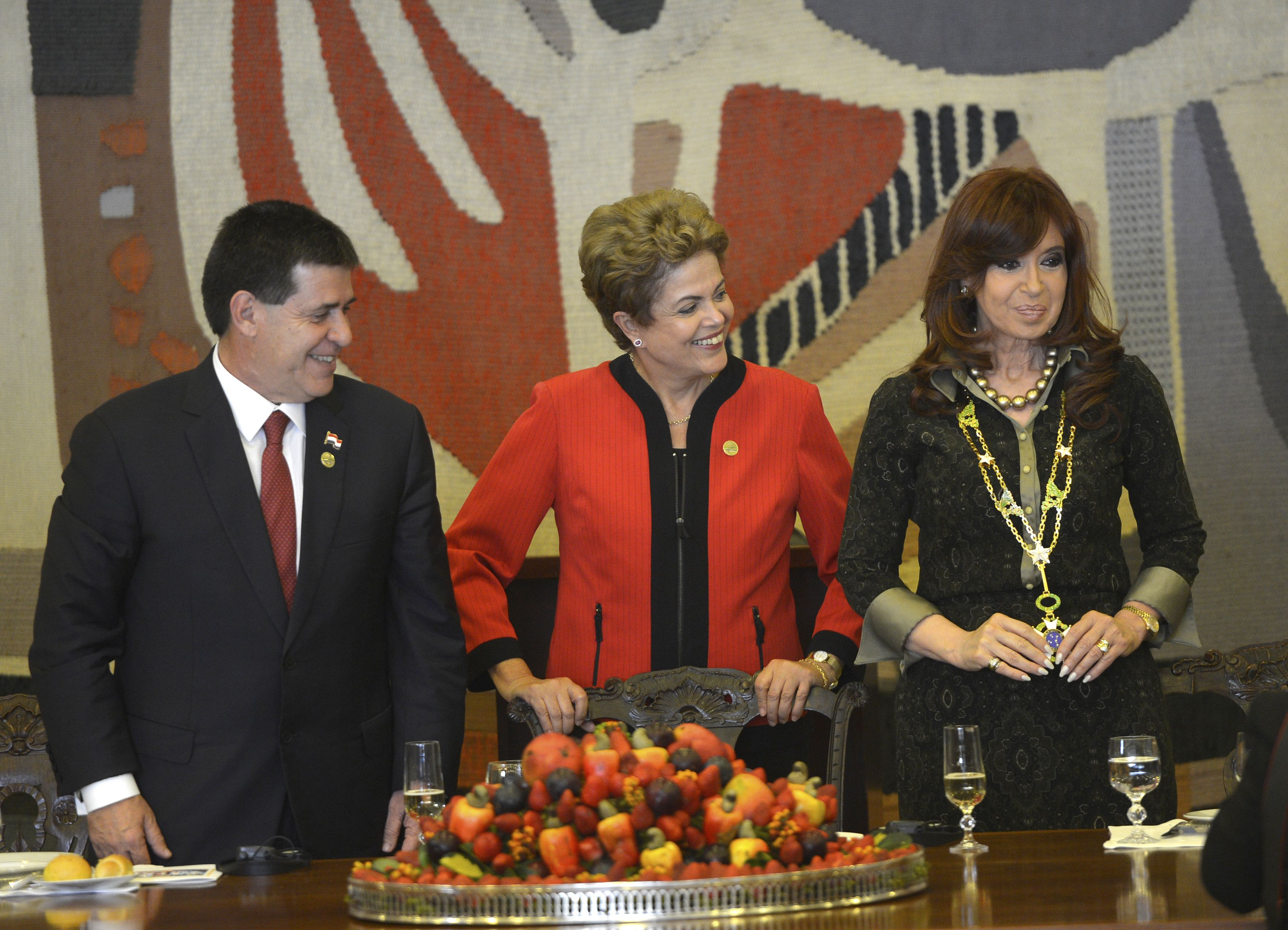 Presidenta Dilma concede a presidenta Cristina Kirchner colar da Ordem do Cruzeiro do Sul. A seu lado, o presidente paraguaio, Horacio Cartes.